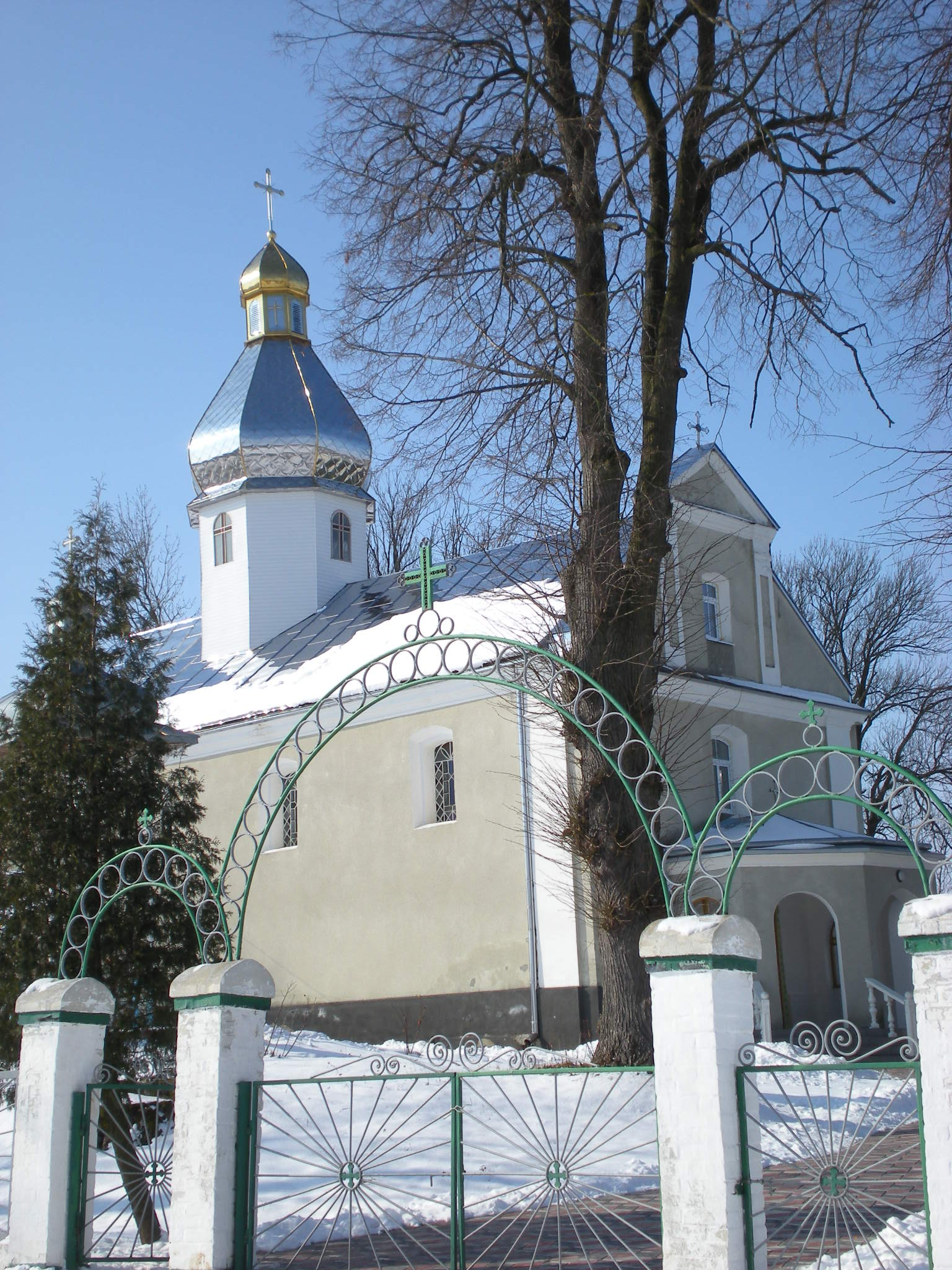 Hordynya, Lviv Oblast, Ukraine, 81466